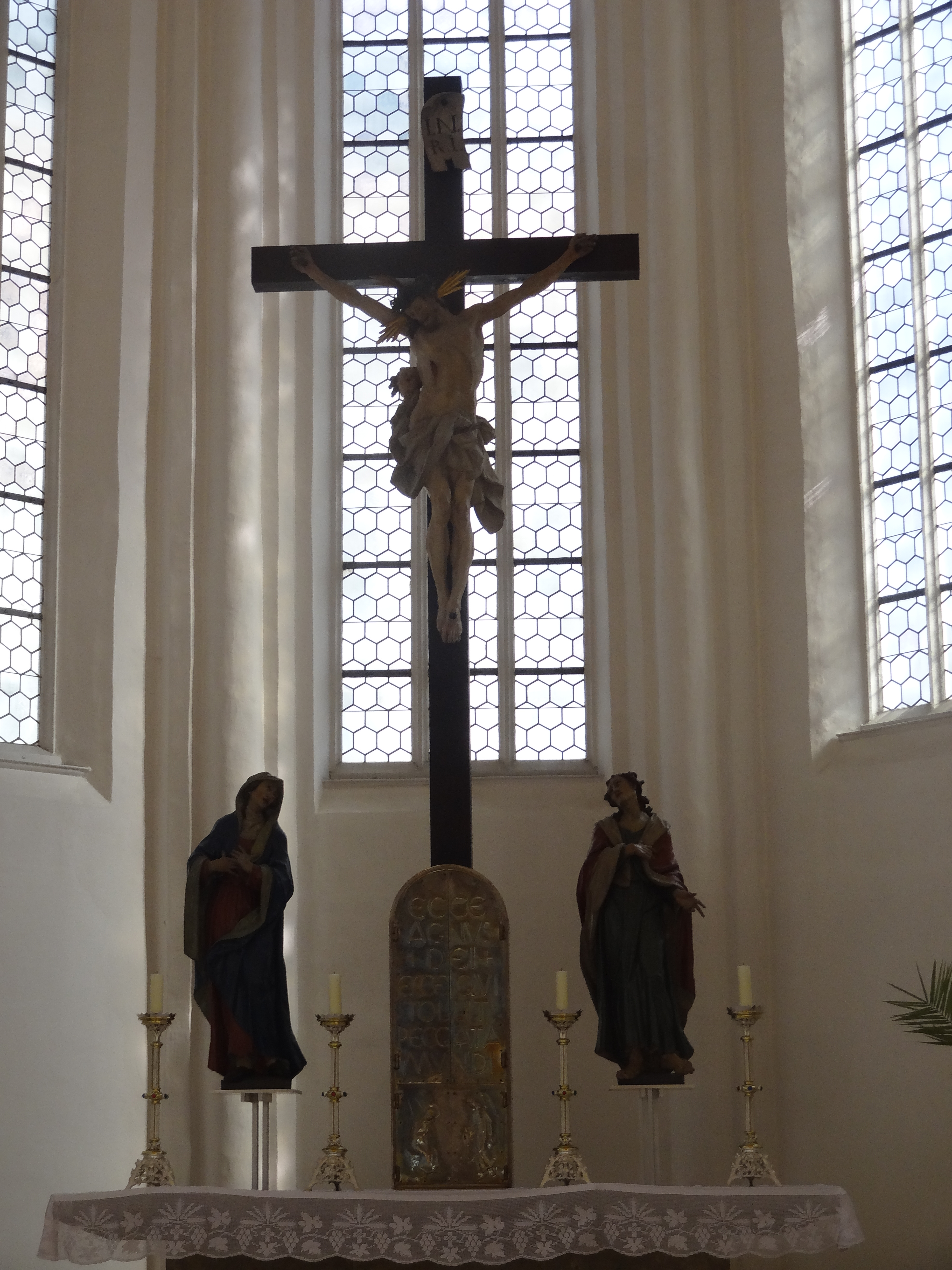 Altarkreuz von Christian Jorhan d. Ä. (1779) in der Kirche Alt-St. Nikola in Landshut